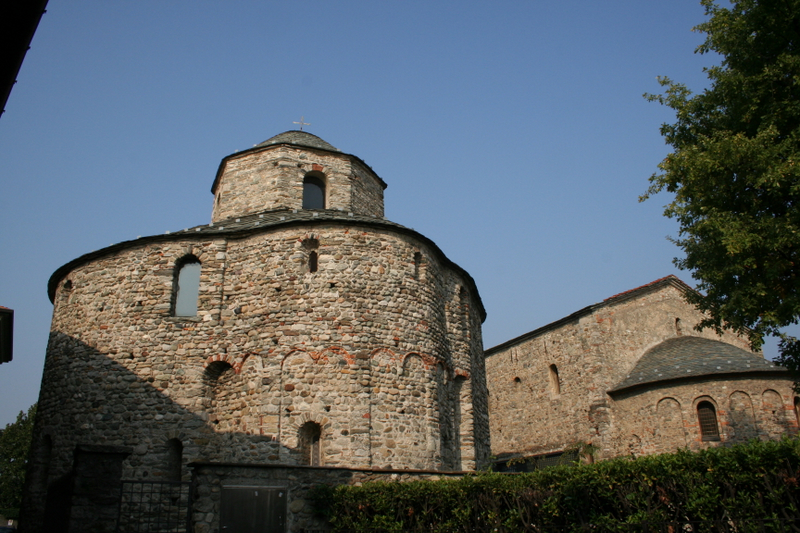 Battistero San Galliano, retro, Cantù.